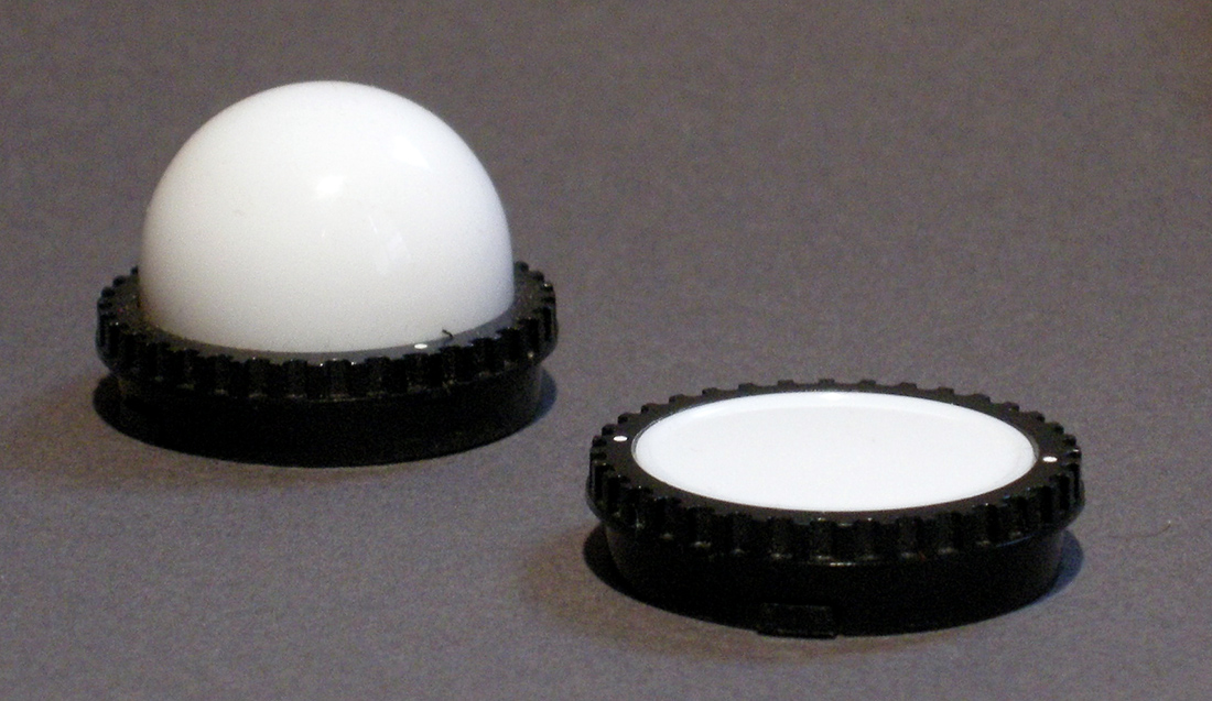 Diffuseurs de posemètre L398